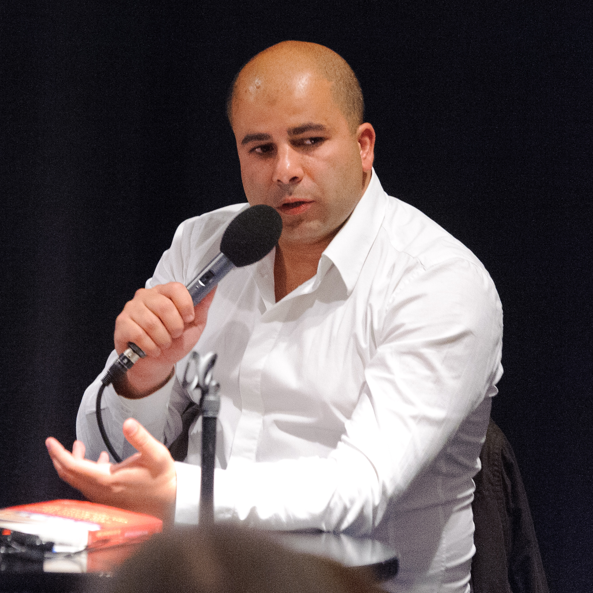 Die deutsch-israelischen Literaturtage - organisiert vom Goethe-Institut und der Heinrich-Böll-Stiftung - finden seit sechs Jahren abwechselnd in Berlin und in Tel Aviv statt. Neben Lesungen und Diskussionen gibt es im April auch Filme zu sehen. Abgeschlossen wird *beziehungsweise(n)* durch eine Diskussionsrunde, in der Aktivist/innen, Journalist/innen und Autor/innen über den Begriff der Solidarität, über gesellschaftliche Vorstellungen des Zusammenhalts und der sozialen Gerechtigkeit debattieren. Foto: Stephan Röhl